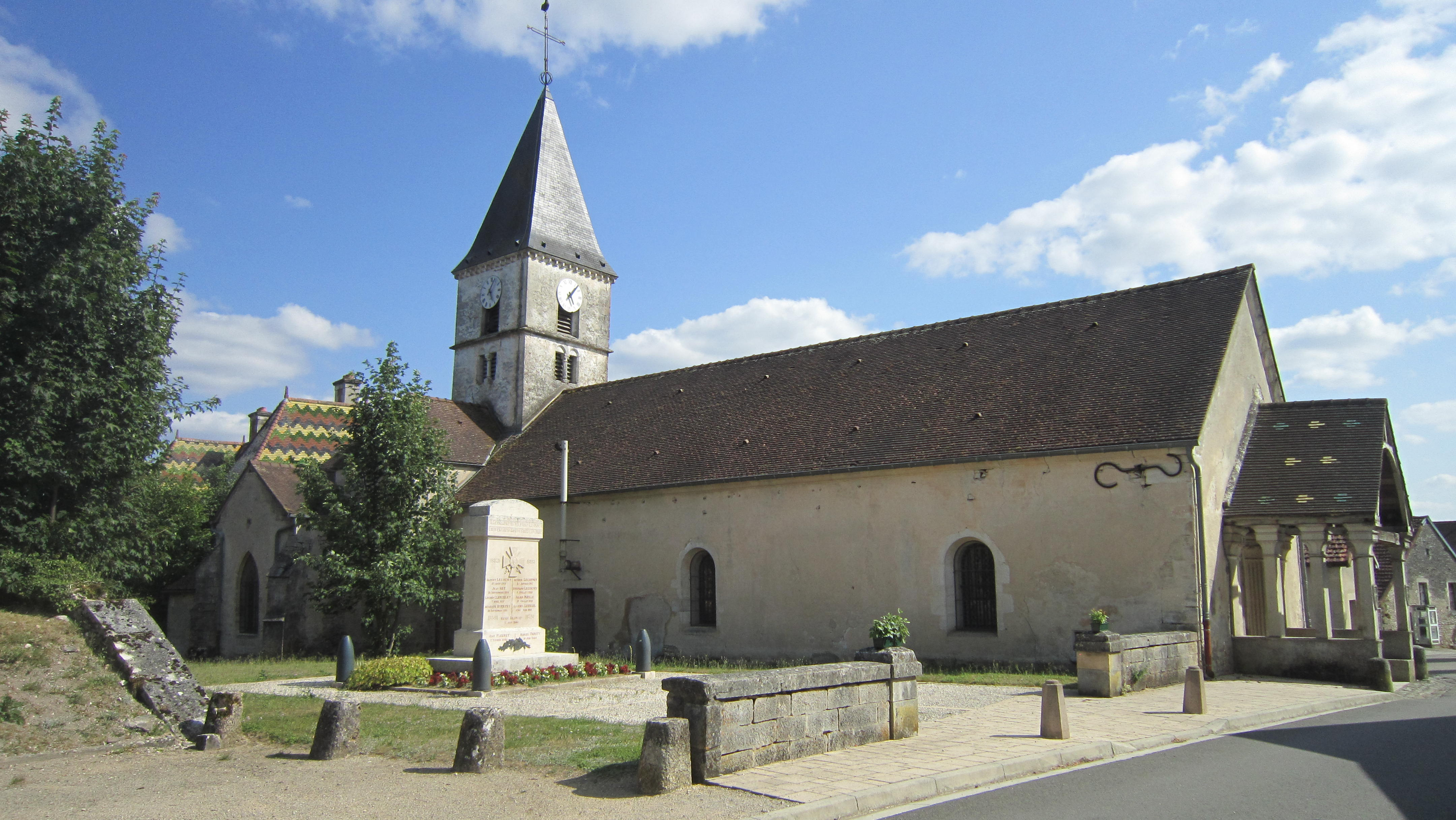 Eglise de Villiers-le-Duc (Côte-d'Or)